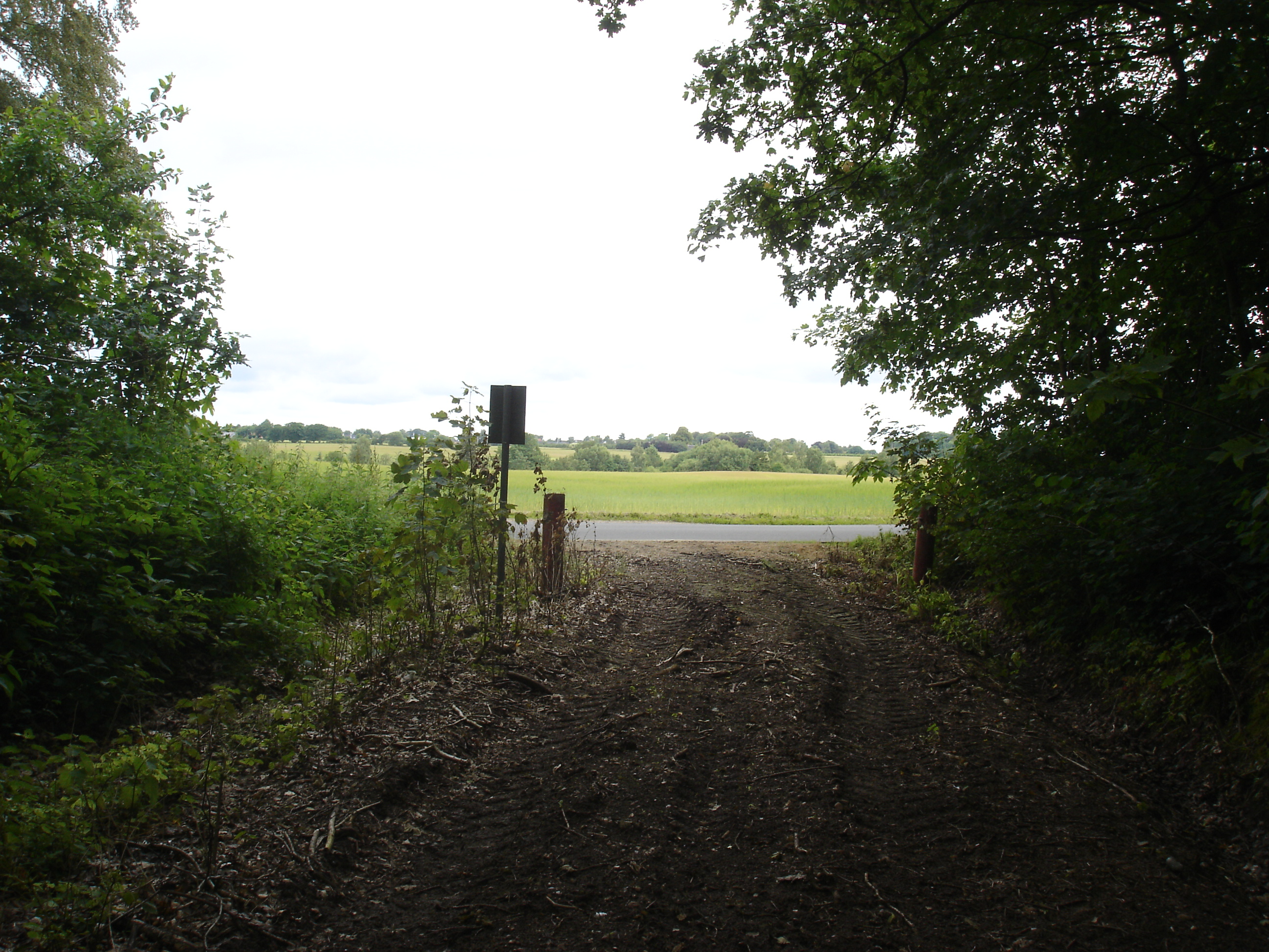 Kjellerupbanens bevarede tracé gennem Bakkeskov slutter ved Sjørslevvej - på den anden side af vejen lå Aunsbjerg trinbræt